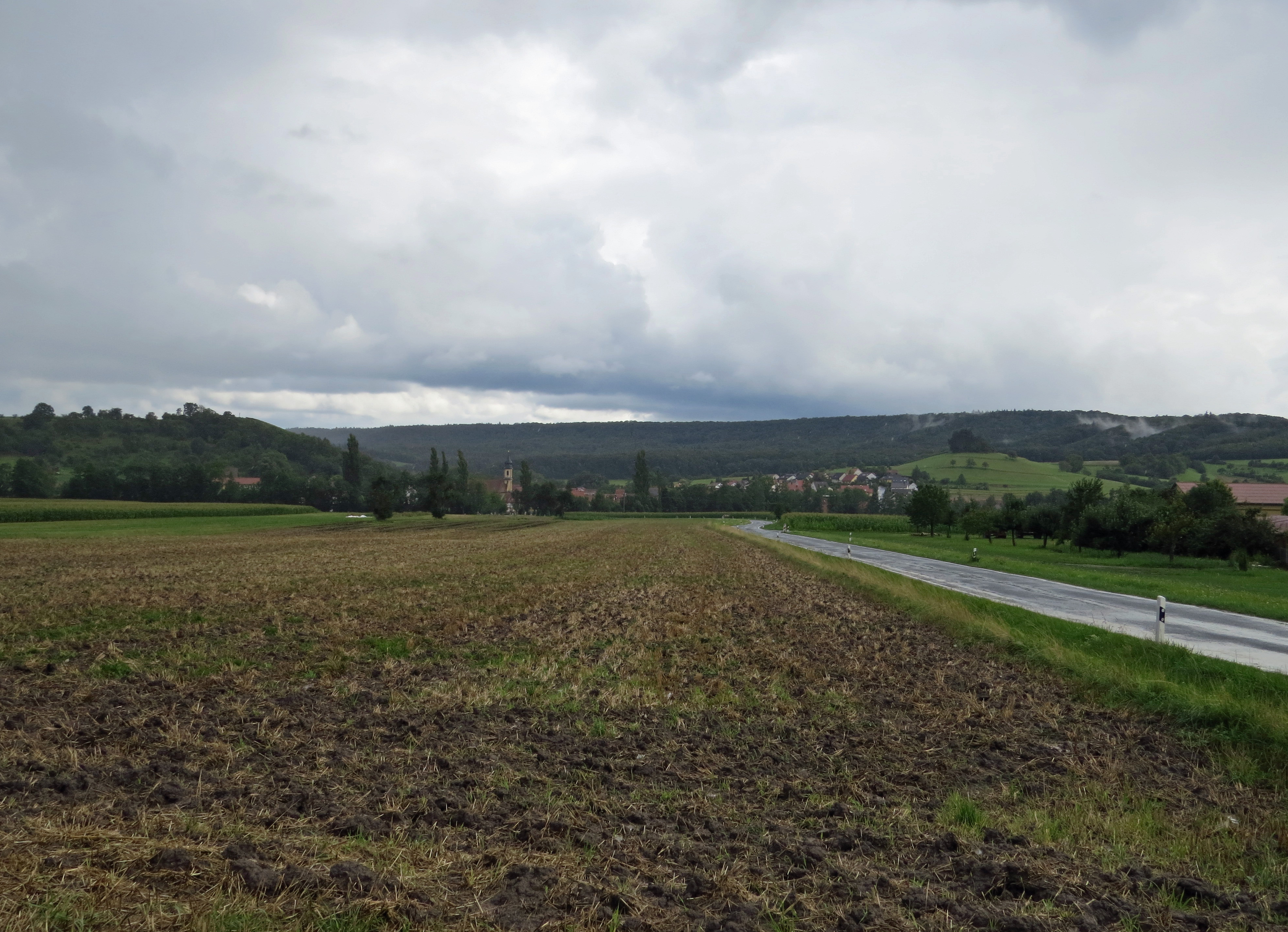 Michelau im Steigerwald von Norden